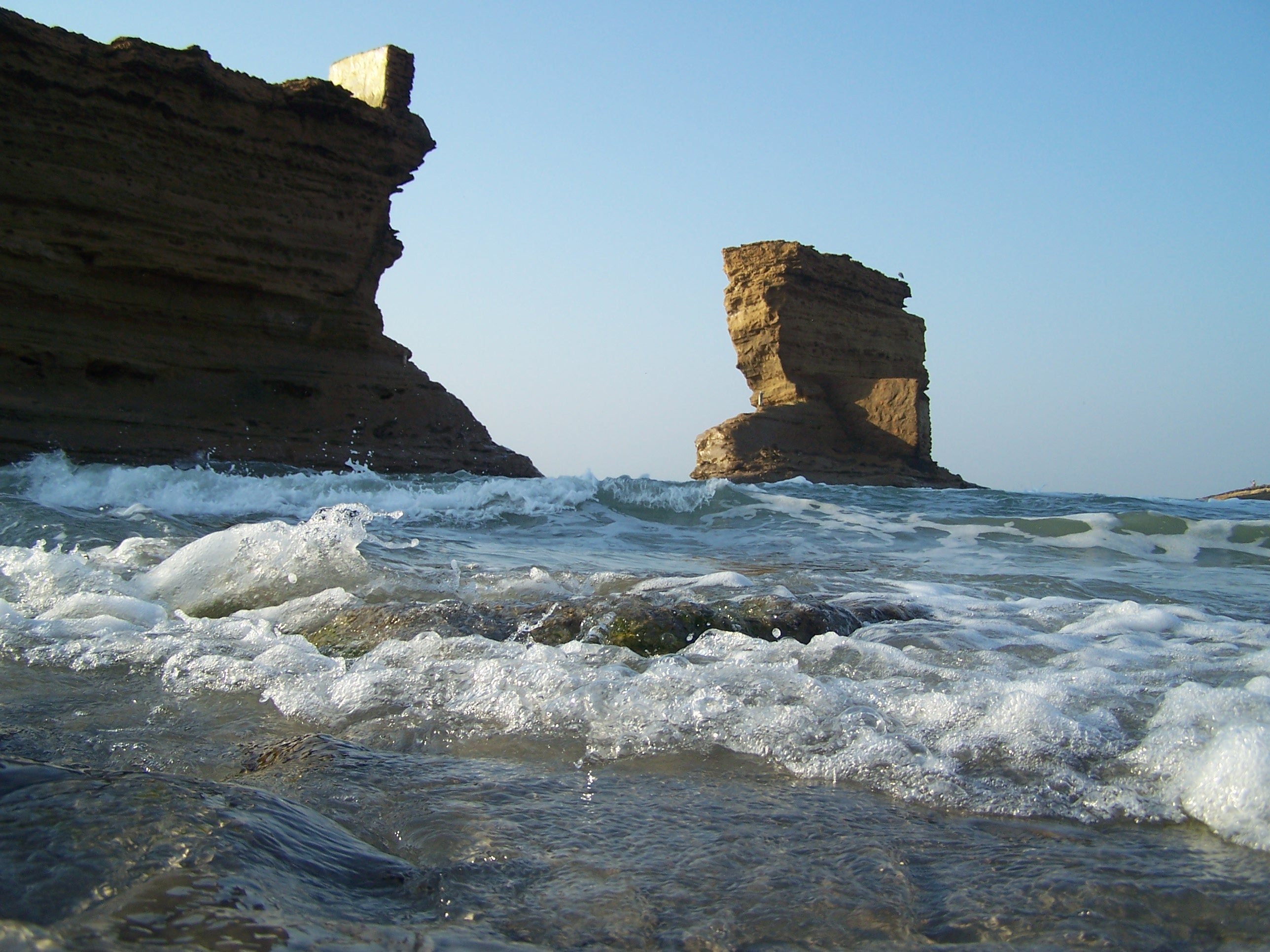 Paradise Point, Pakistan